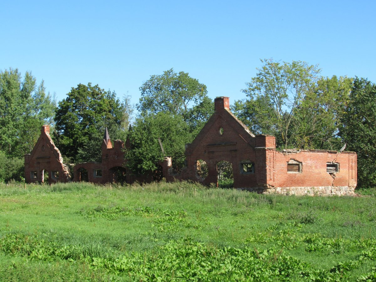 Сядзібна-паркавы ансамбль Мірскіх у в. Камянполле Мёрскага раёна Віцебскай вобласці. Стайня (знесена ў 2019 годзе)